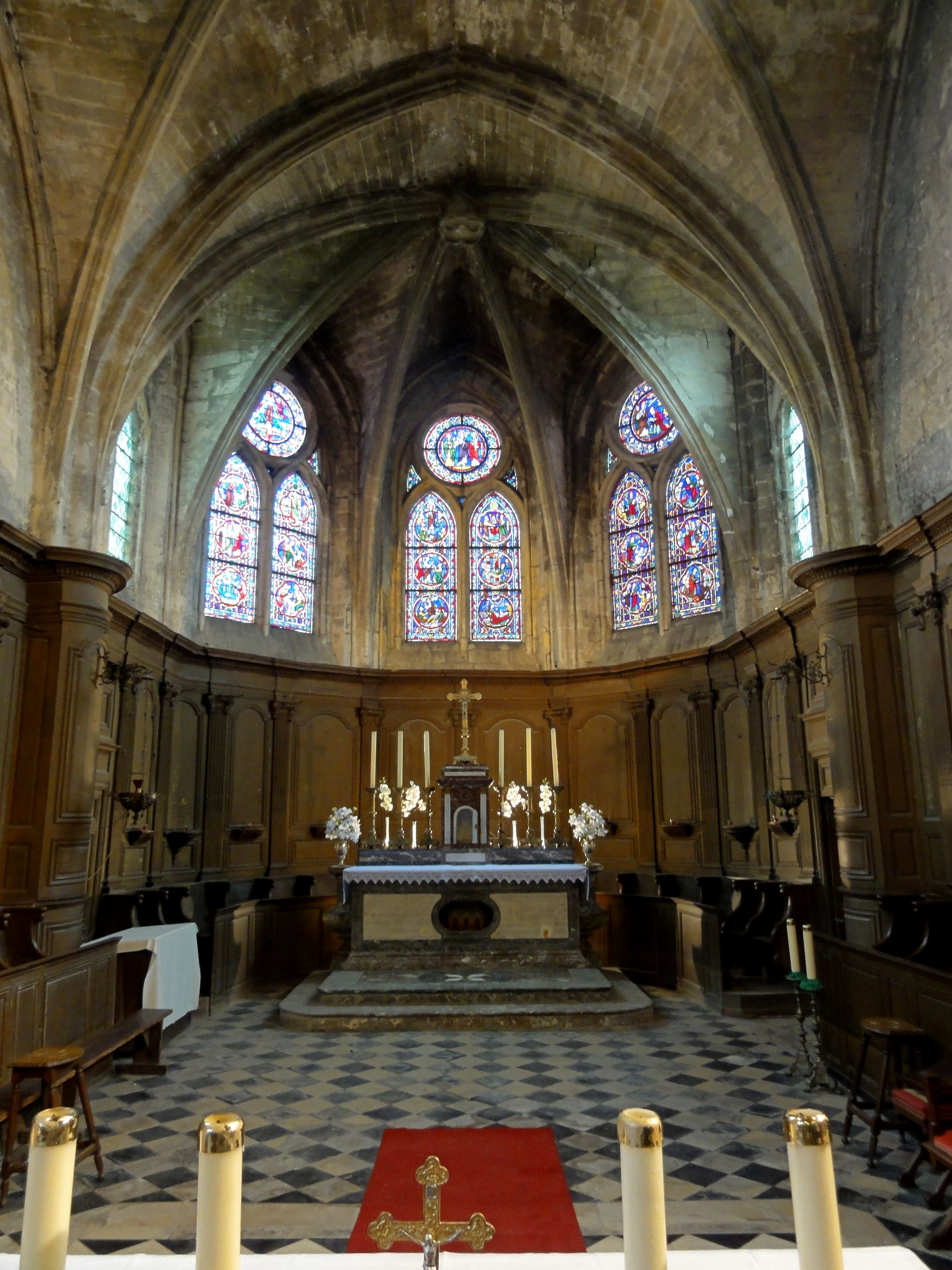 Chœur.